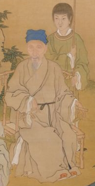 中文（台灣）: 唐時升（1551年－1636年），字叔達，號灌園叟，直隸嘉定縣人，晚明詩人。